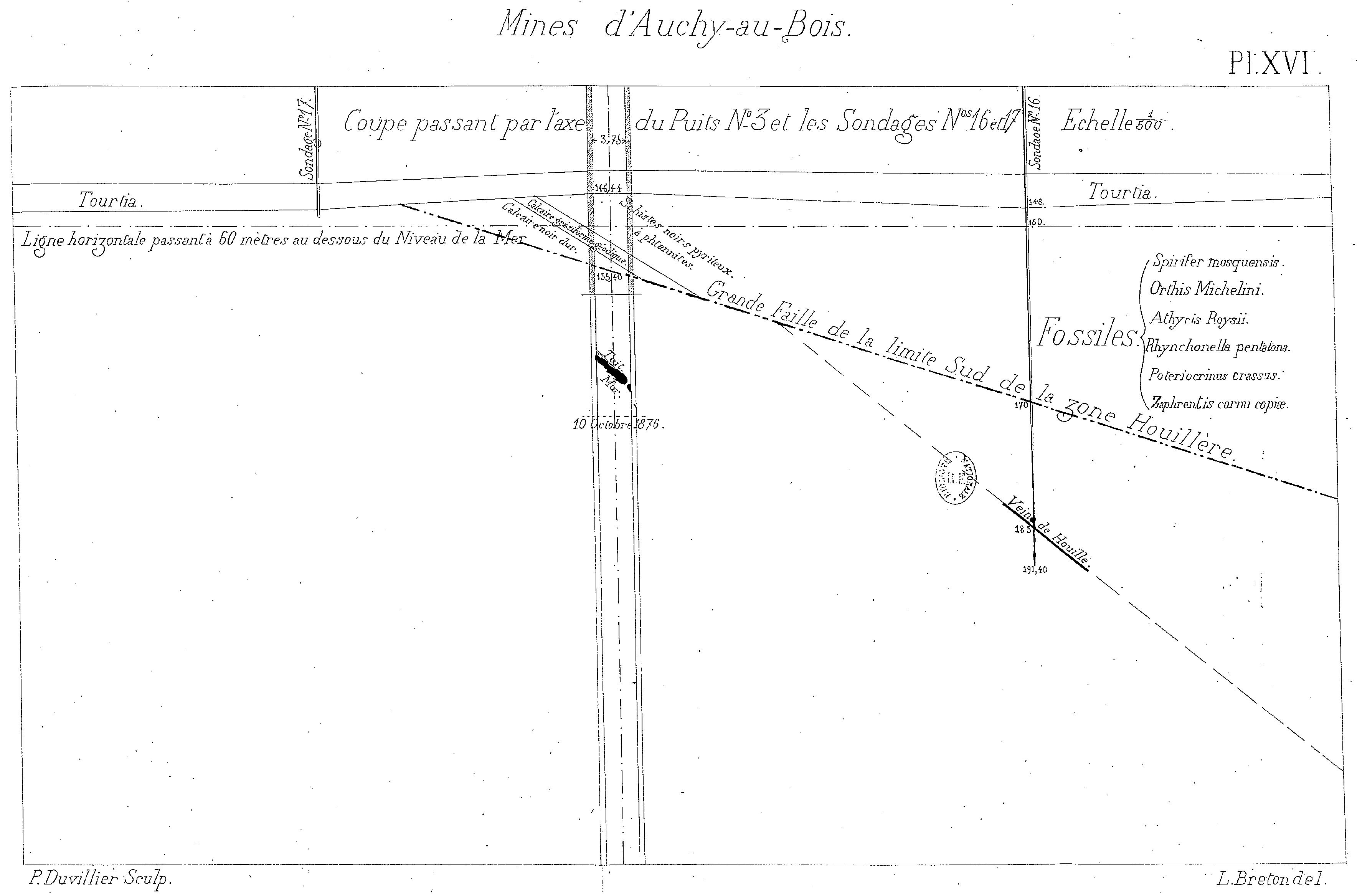 Compagnie des mines d'Auchy-au-Bois.